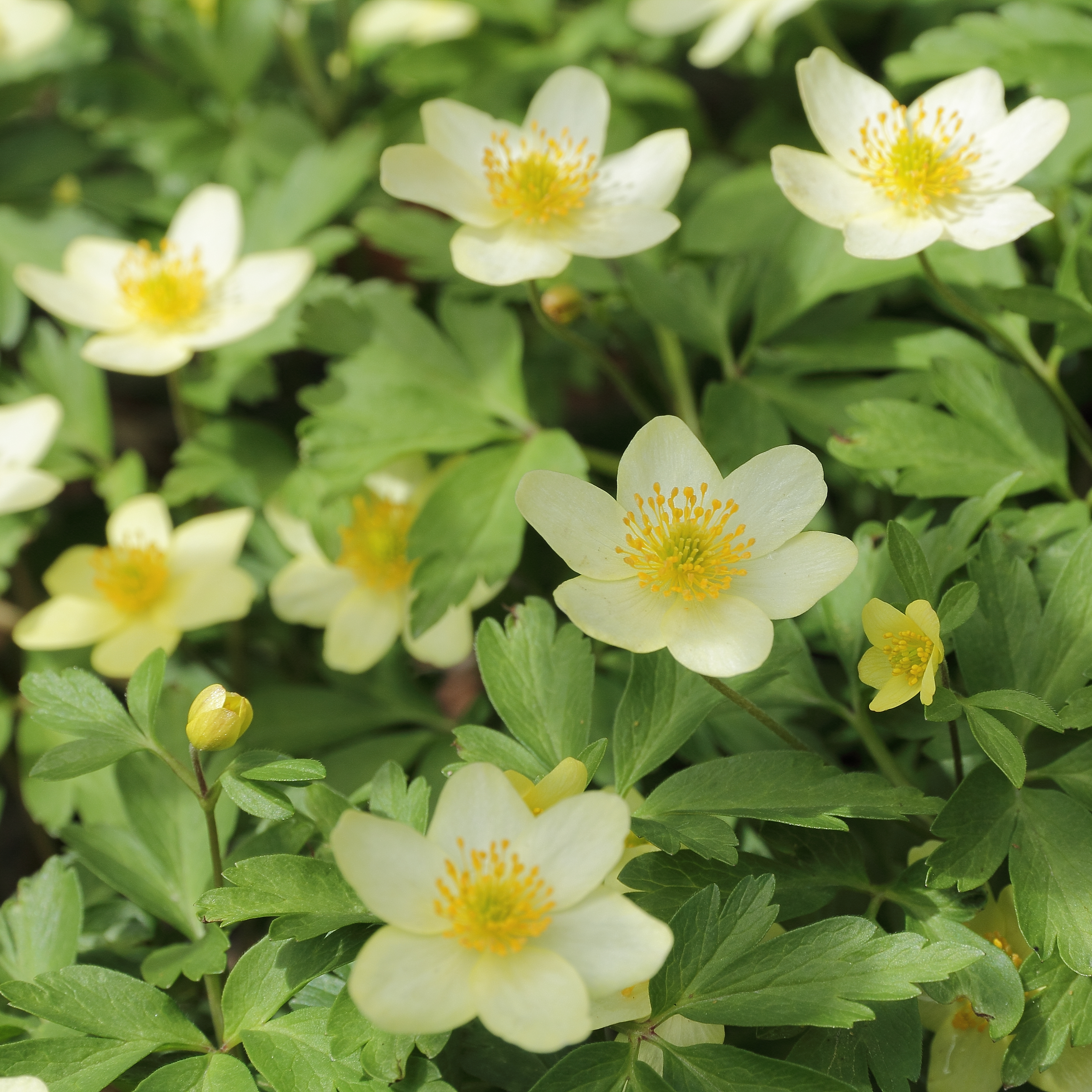 Anemone × lipsiensis i Bergianska trädgården.